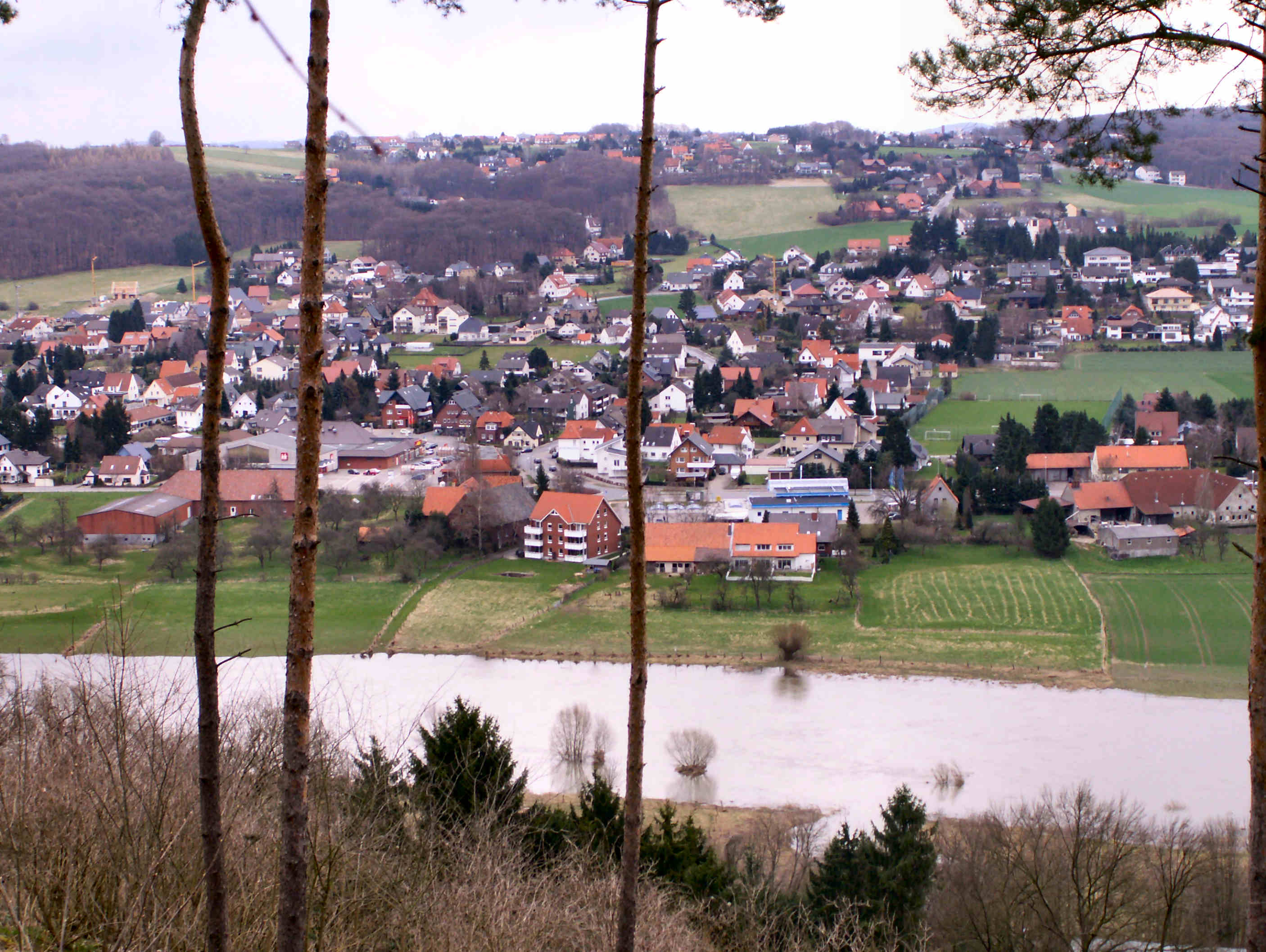 Blick nach Osten von der Burg Vlotho auf den rechts der Weser gelegenen Kernbereich des Stadtteiles Uffeln. Im Hintergrund ist der sich durch den Ortsteil von Süden nach Norden ziehende Buhn genannte Höhenrücken zu sehen. Die Weser führt zu diesem Zeitpunkt mäßiges Hochwasser. - Der im Artikel genannte Borlefzener Kirchweg verläuft nahezu identisch mit dem im Bild zu sehenden Horizont